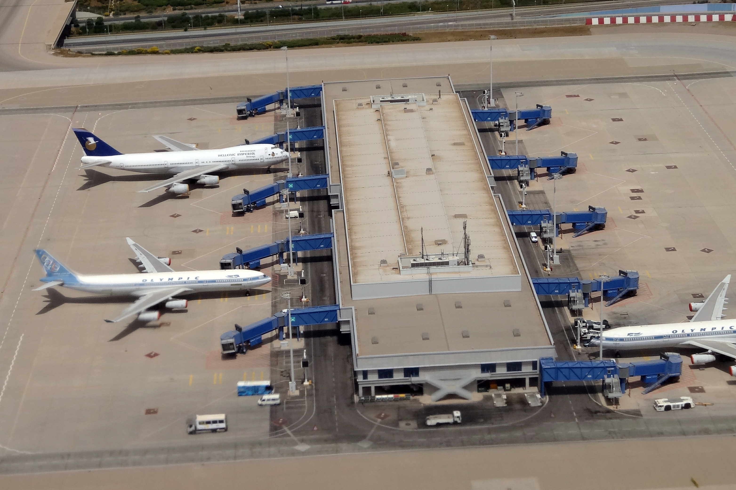 ATH FROM LN-RGA 737 SAS